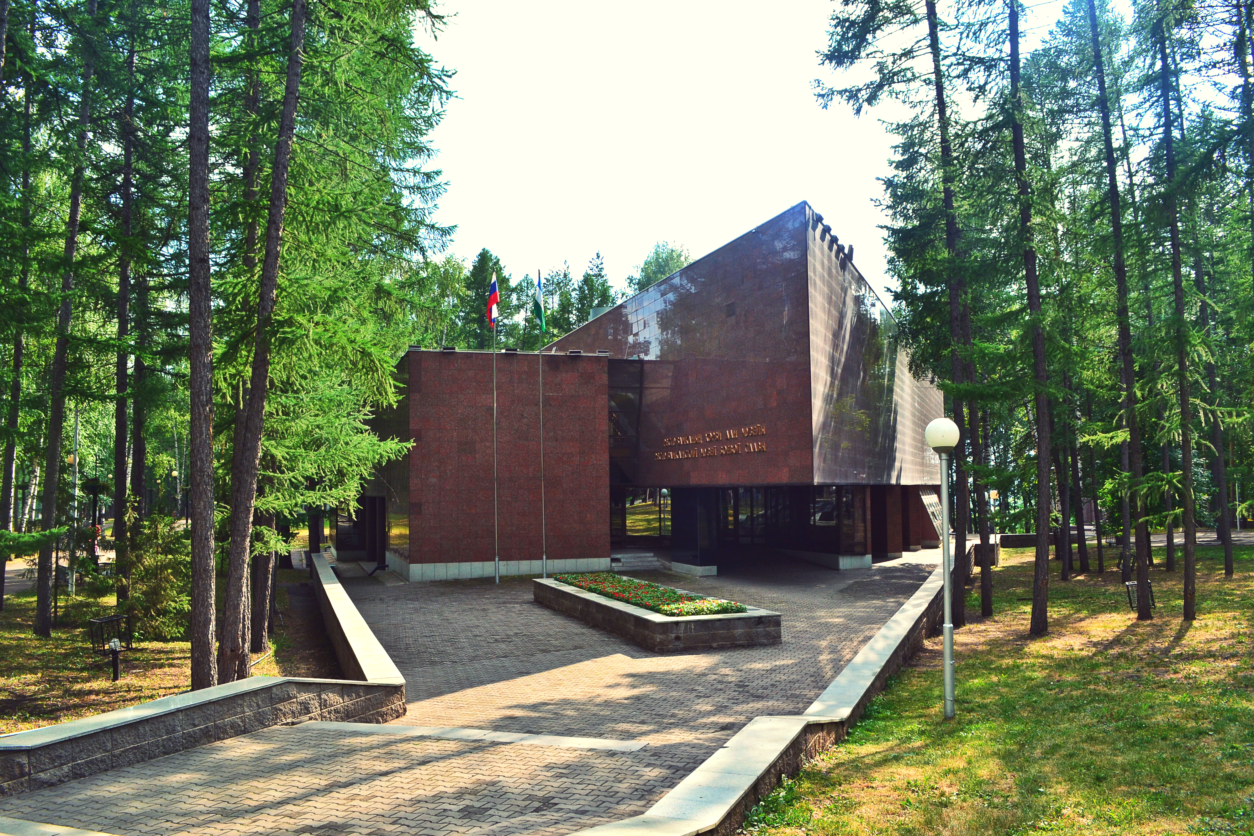 Парк победы (Республика Башкортостан, Уфа, )